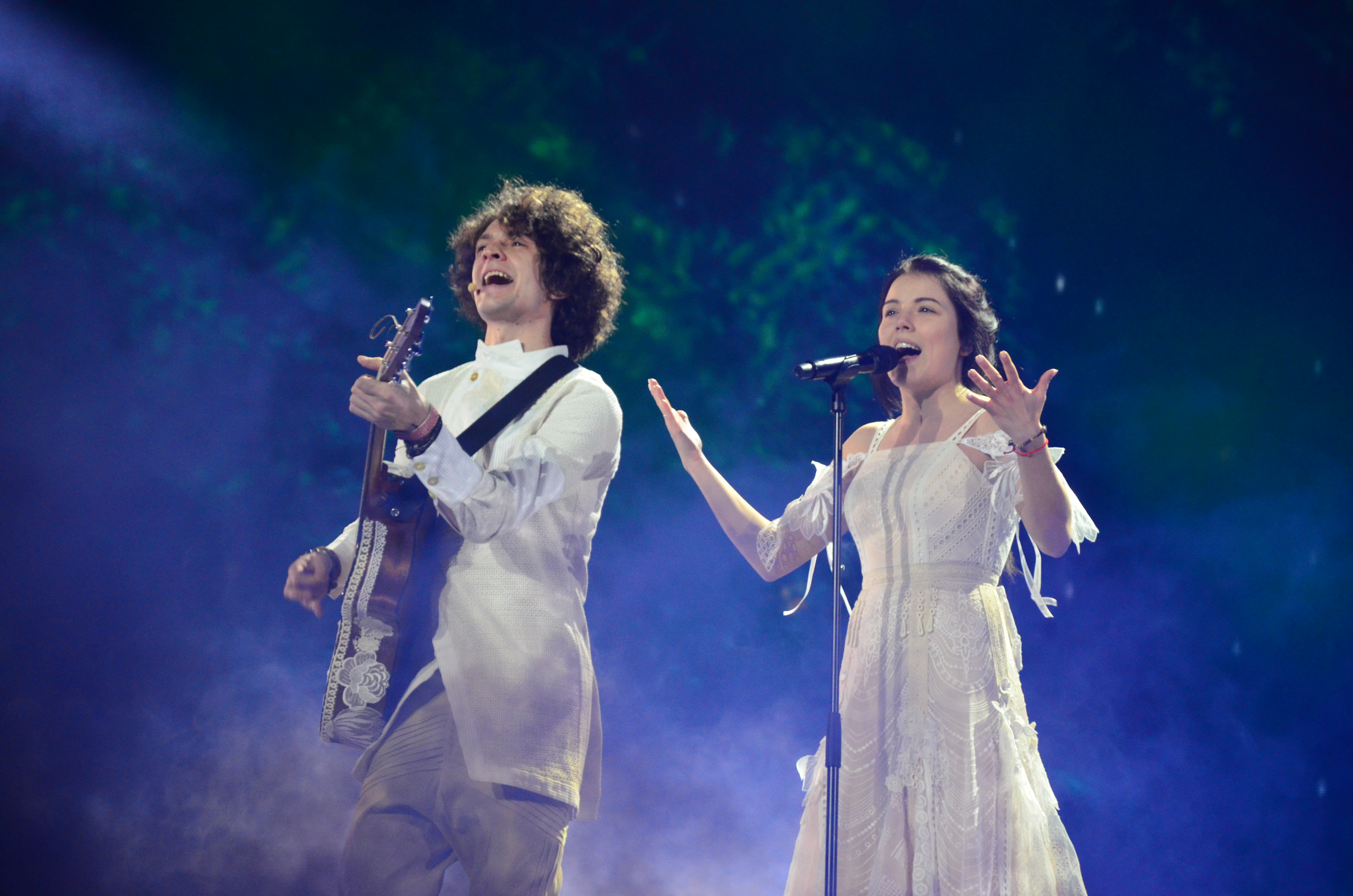 10 травня 2017 року у Києві відбулась генеральна репетиція 2 півфіналу "Євробачення".